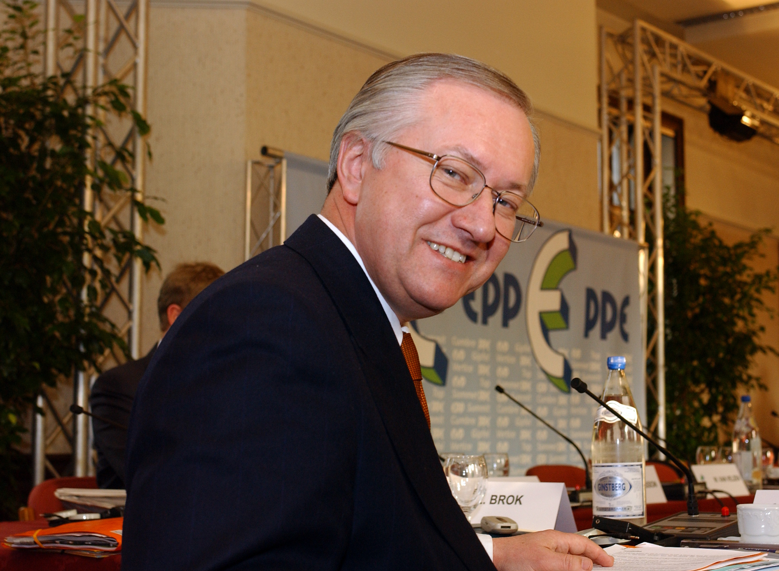 EPP Summit Meise 16 December 2004